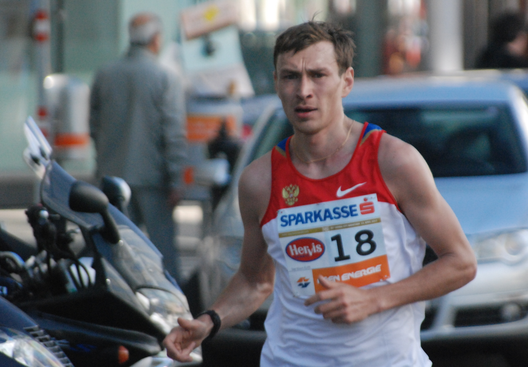 Oleg Marusin beim Vienna City Marathon 2013 auf der Mariahilfer Straße im 15. Wiener Gemeindebezirk